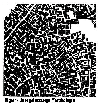 Beispiel für eine Darstellung von "Figur - Grund". Das Bild zeigt einen Ausschnitt der unregelmässigen Baustruktur von Algier. Deutlich erkennbar sind zwei durchgehende gerade Strassen und eine stark gekrümmte Hauptstrasse. Die Bebauung ist sehr kompakt und stellt einen Grenzfall von Bebauungsdichten dar.